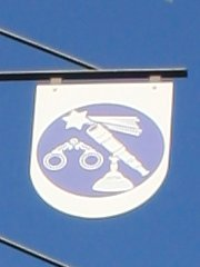 Walldorf, Baden-Württemberg: Wappenbaum an der Hauptstraße: Innungswappen der Augenoptiker